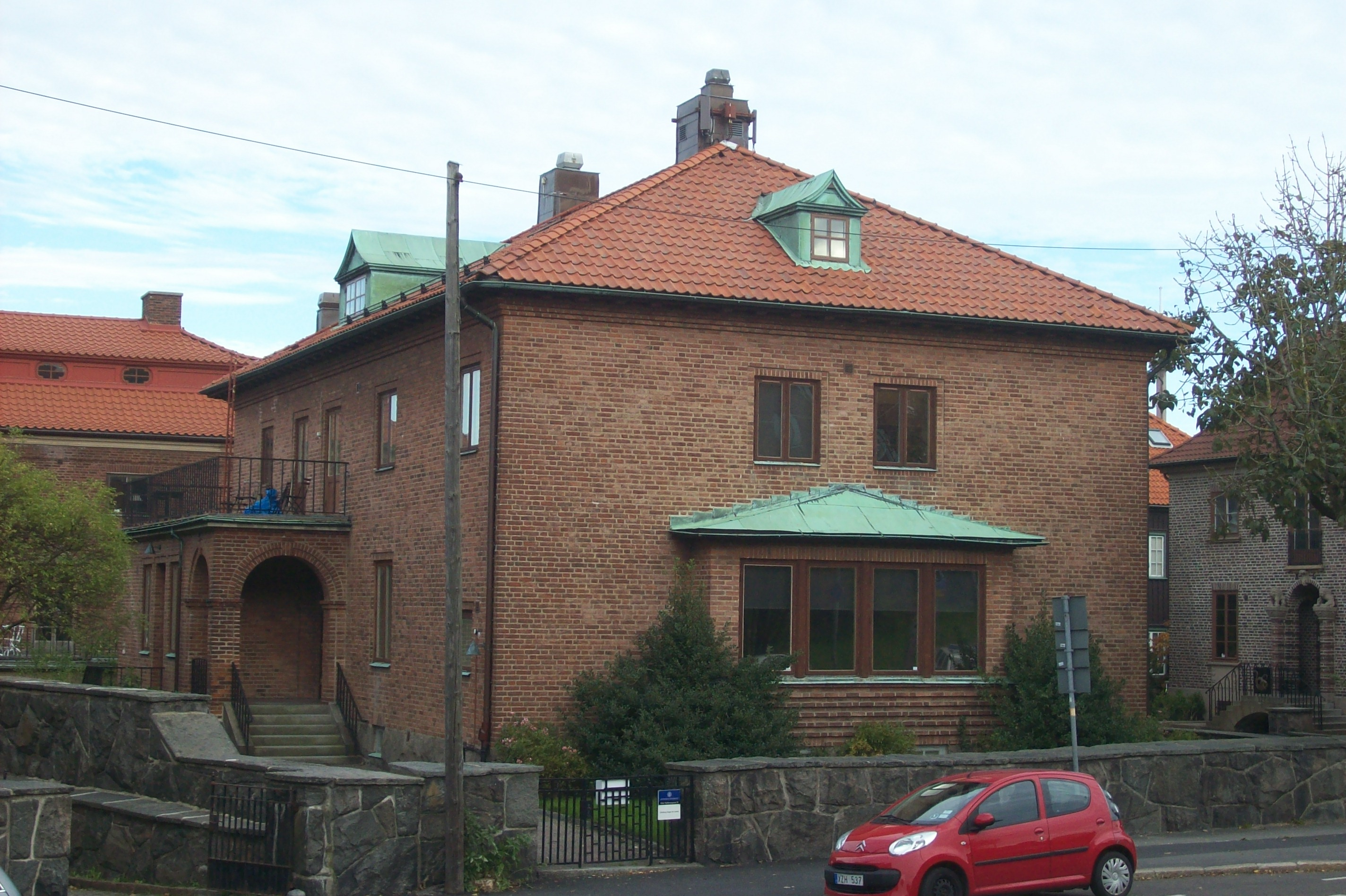 Göteborg Lorensberg 11:4, Lorensbergs Villastad. Viktor Rydbergsgatan 24, Göteborg